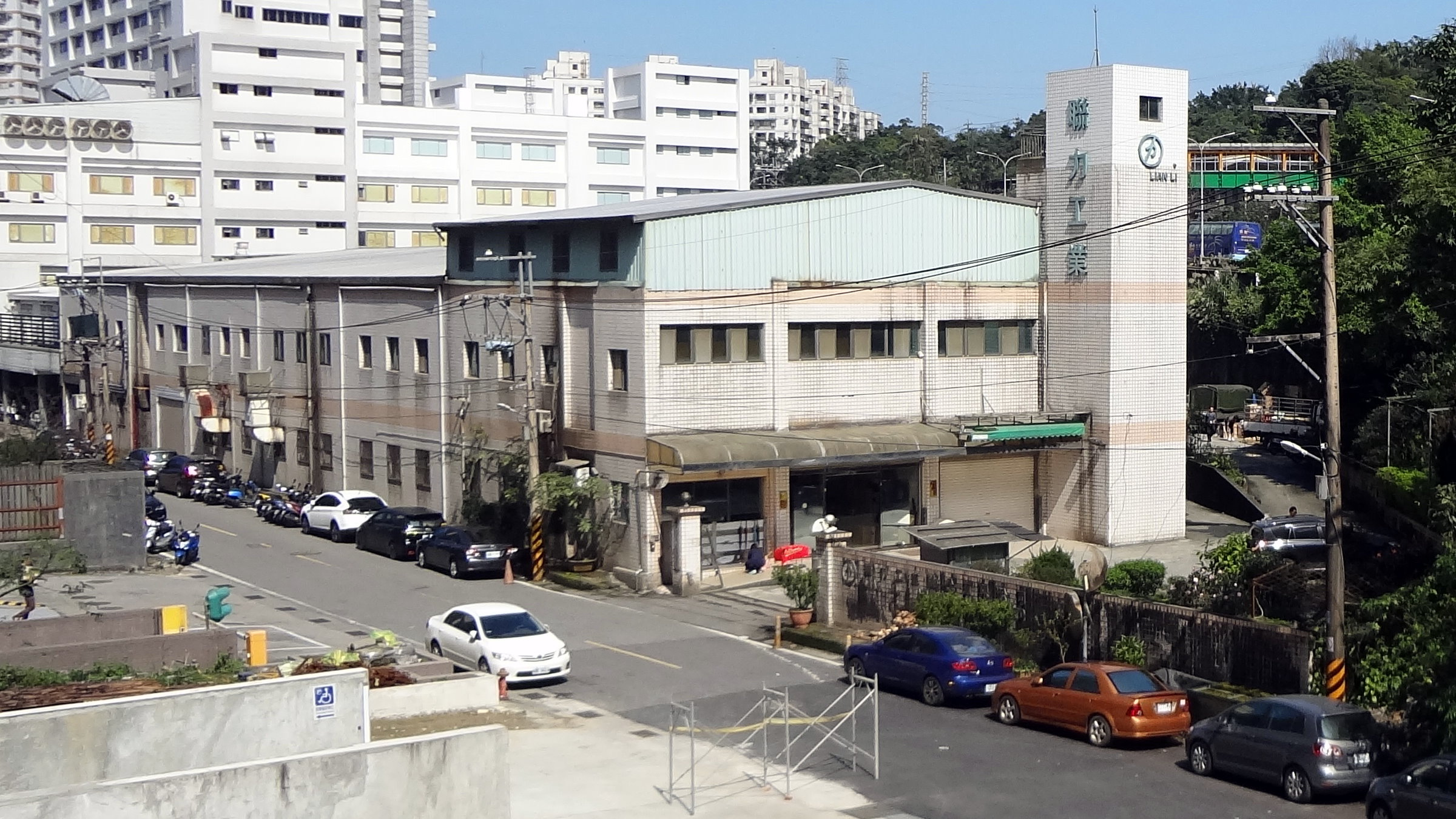 從基隆市七堵區明德二路俯瞰聯力工業總部。